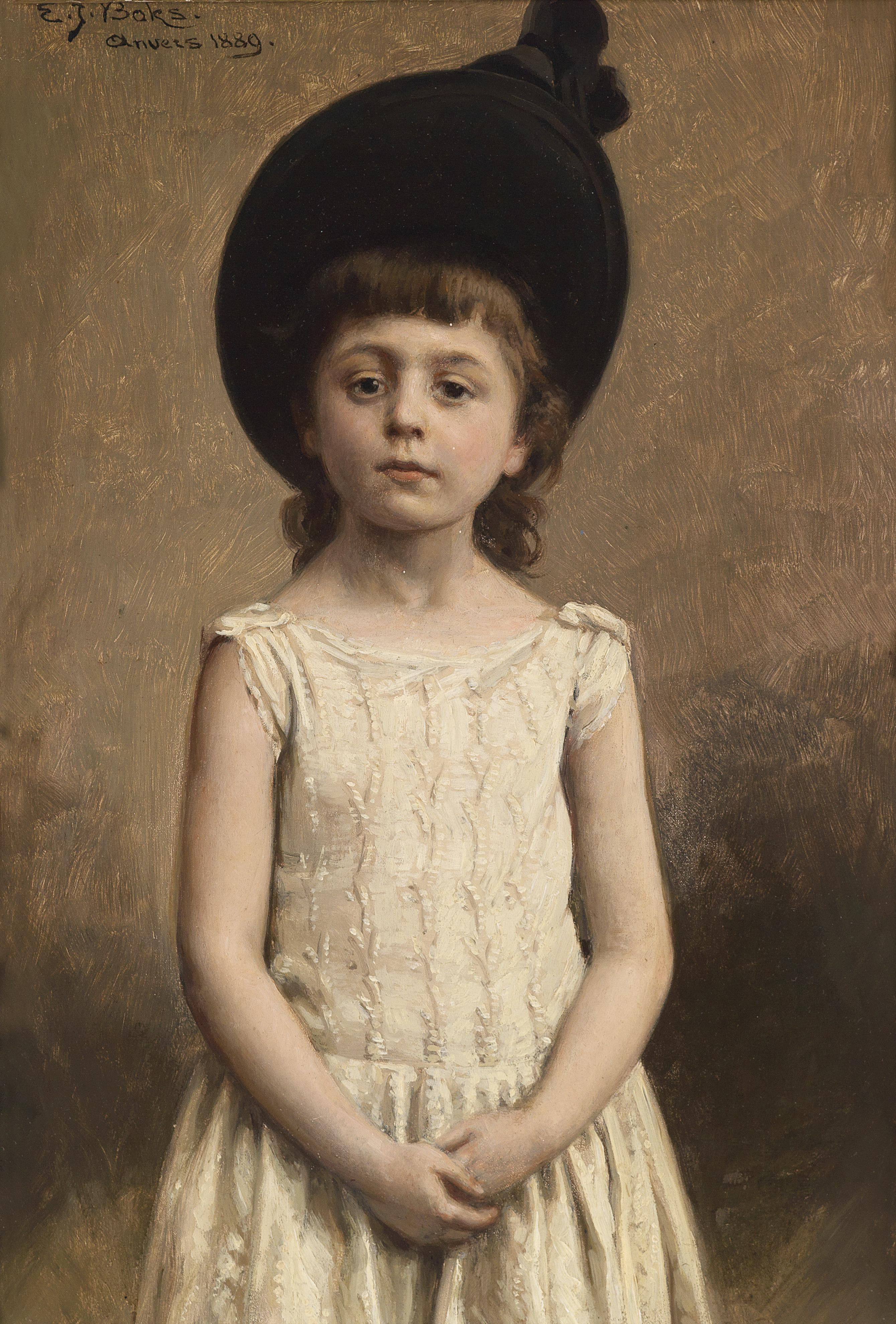 Der schwarze Hut, signiert, datiert E. J. Boks, anvers 1889, Öl auf Holz, 36,5 x 23 cm